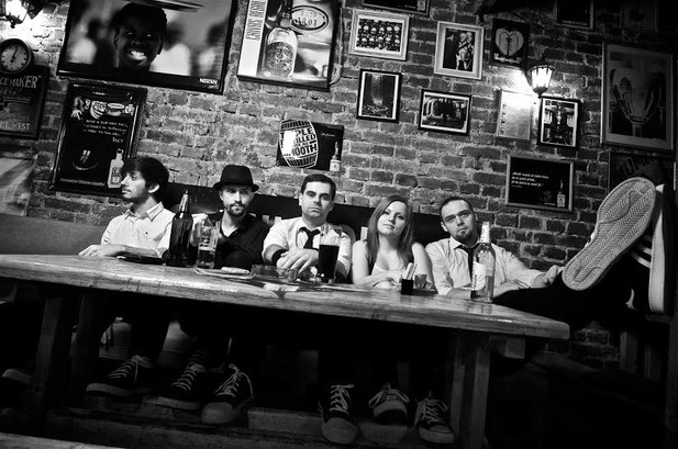 V Migréne